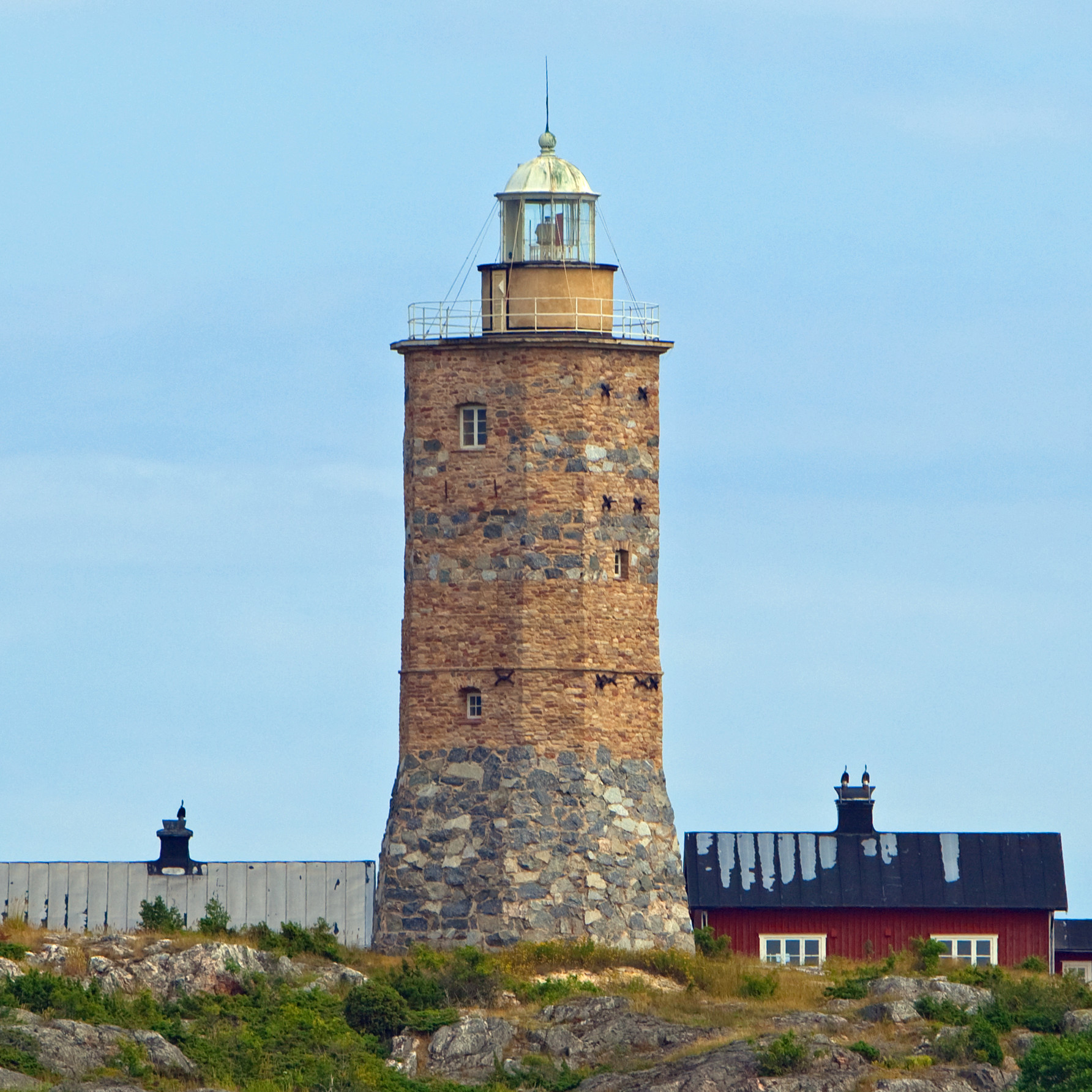 Grönskärs fyr utanför Sandhamn